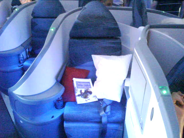 AC 777 cabin